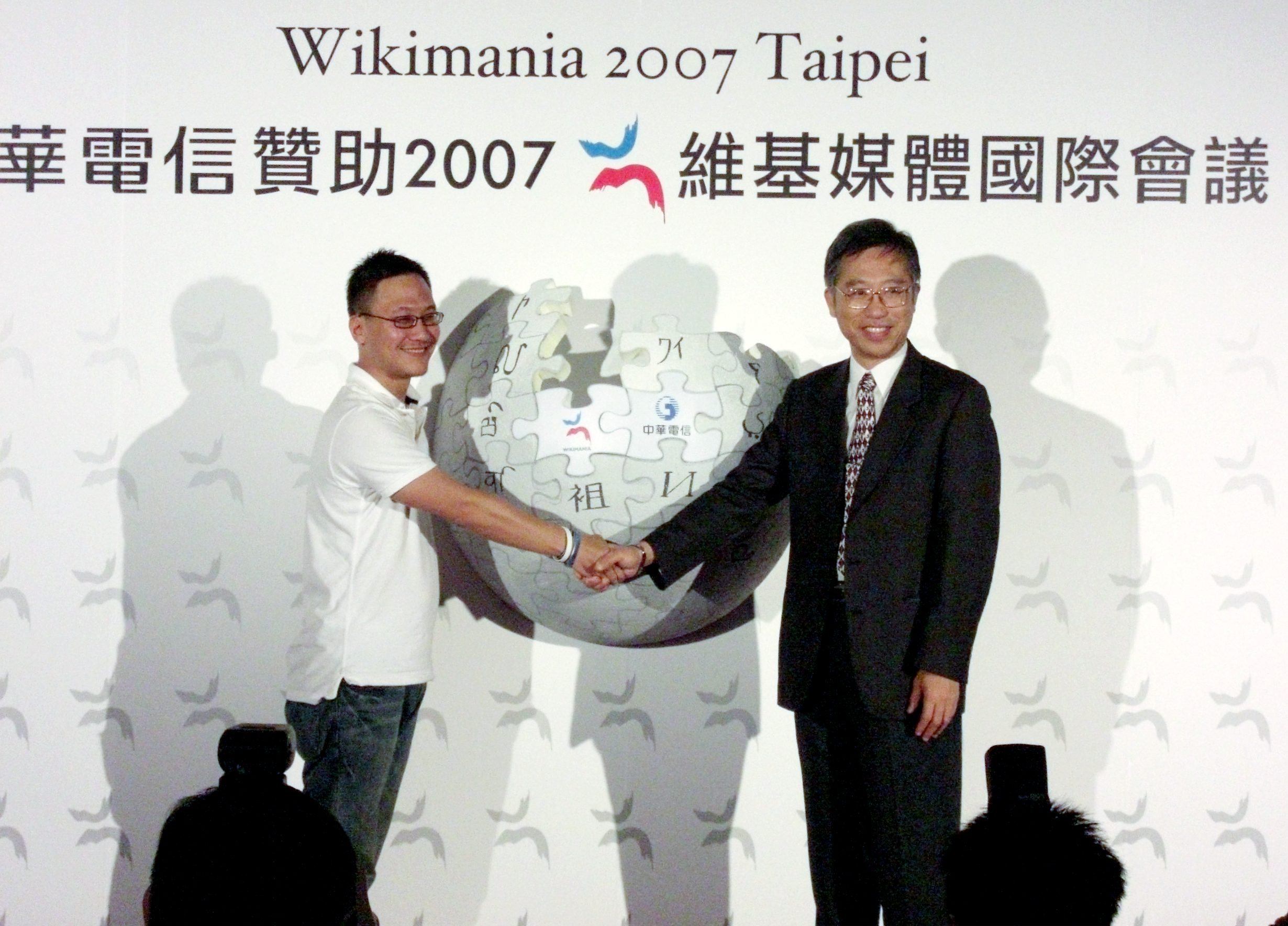 中華電信與維基年會簽約記者會